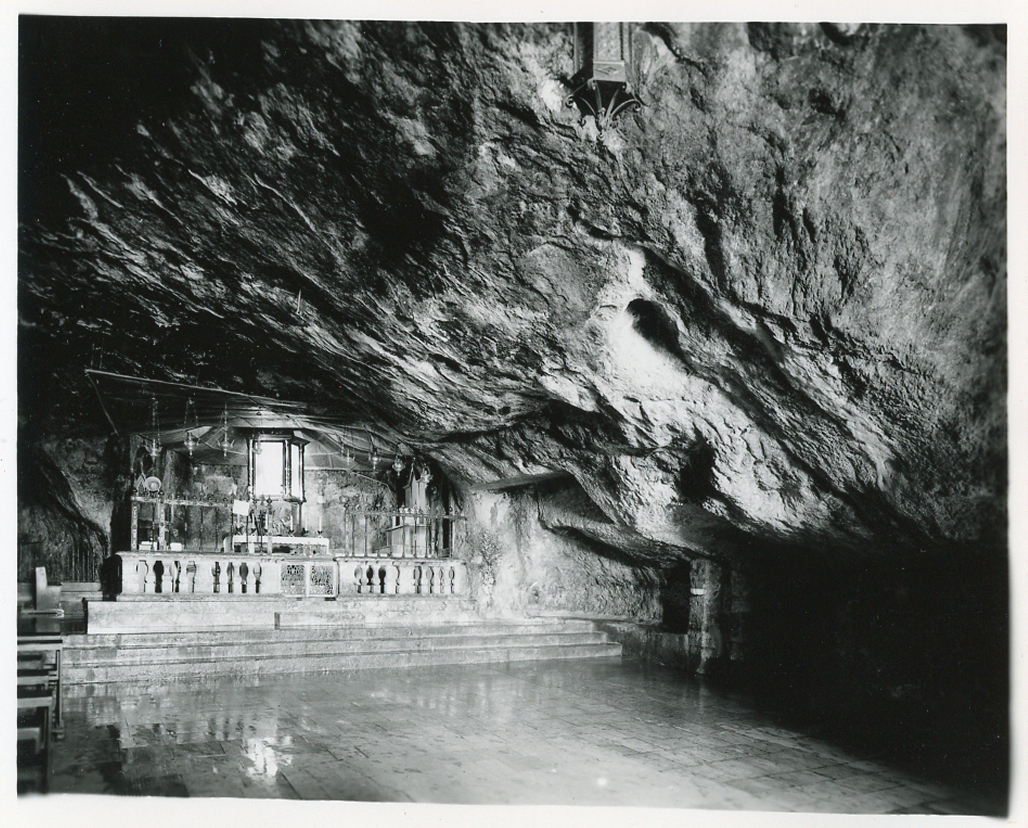 Servizio fotografico : Monte Sant'Angelo, 1965 / Paolo Monti. - Fototipi: 1 : Positivo b/n, gelatina bromuro d'argento/ carta, provino a contatto da pellicola 10x12. - ((Serie costituita da 1 provino a contatto identificato con il n.: 11437. La suddetta serie è contenuta nella scatola identificata con il n. 176; sul coperchio iscrizione manoscritta a pennarello: "Provini.". - Occasione: Documentazione per la pubblicazione: "Puglia", Milano, Electa, 1966. Foto non scelte al 15-09-1965. - Fonte: Agenda di Paolo Monti: Monti/ 2/ 6 giugno 1964 - 31 marzo 1966/ 8194-12420 (1964-1966), presso Archivio Paolo Monti